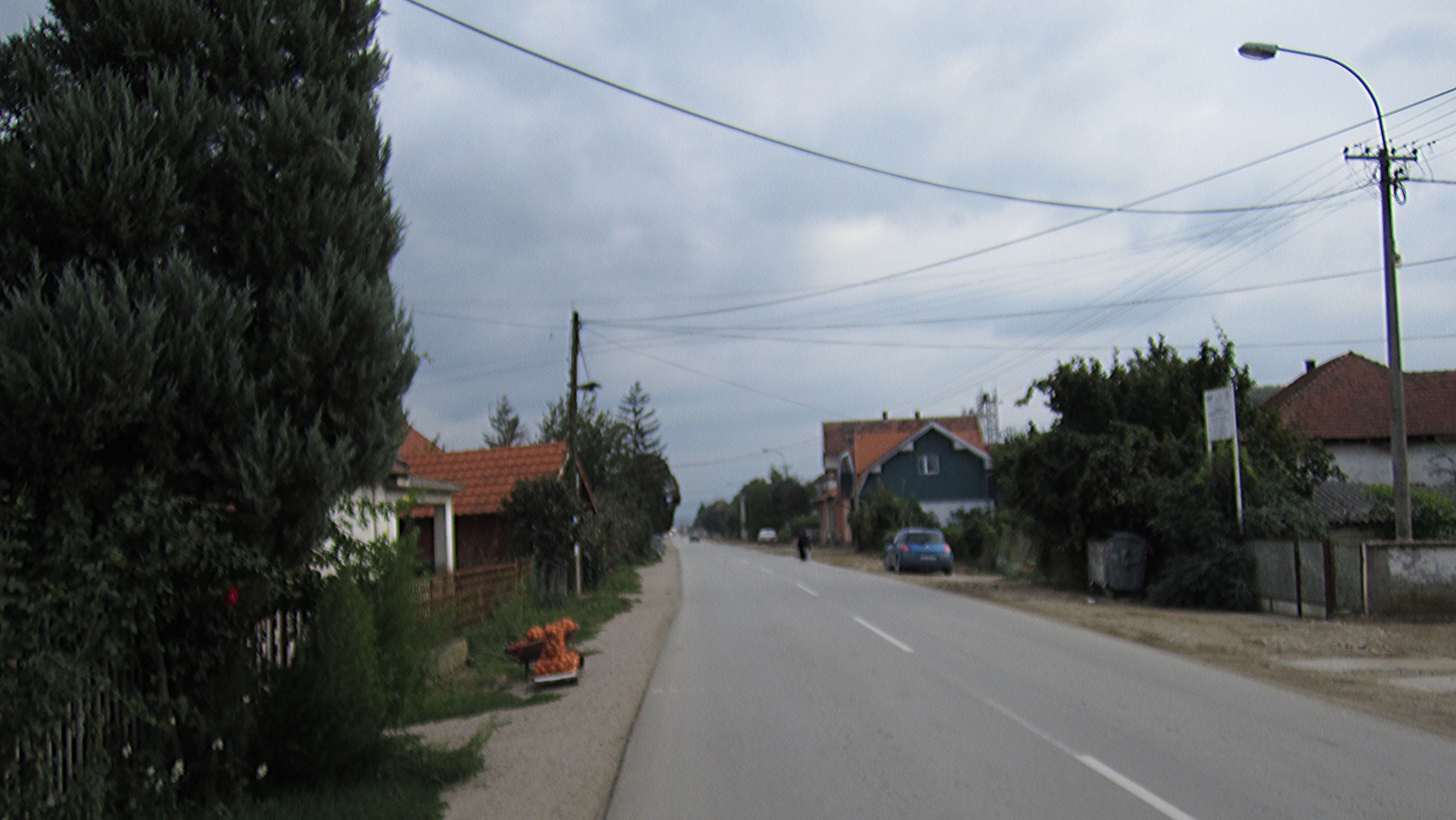 Srpski (latinica): Pečenjevce, Leskovac